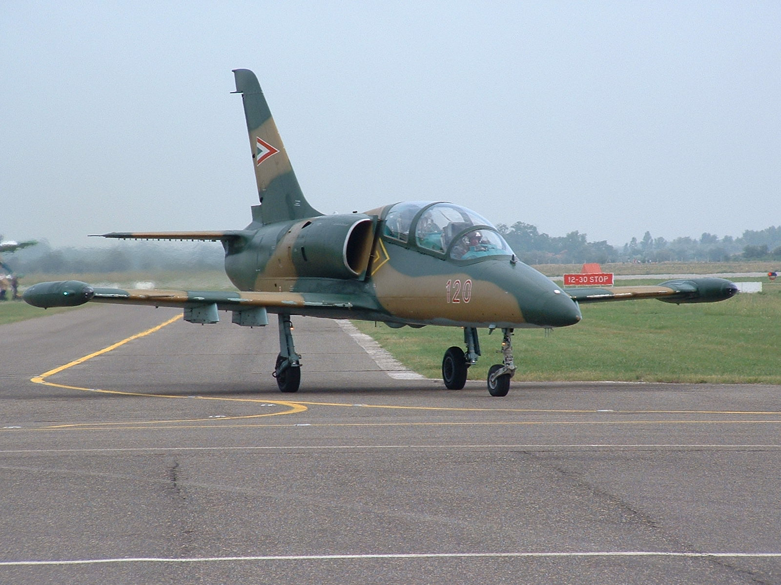 Aero L-39 der ungarischen Luftwaffe an der Flugshow in Kecskemet Sonstiges: Hier eine offizielle Stellungnahme zu allen Bildern von mir, die mit den ungarischen Streitkräften u.A. zutun haben: Diese Bilder wurden von einem Verwandten von mir, der als Mechaniker bei den Ungarischen Streitkräften arbeitet, in meinem Auftrag erstellt. Und sind keine Kopien o.Ä., welche dem ungarischen Staat gehören würden. Aufgenommen wurden die Bilder an der Flugshow 2004 in Kecskemet. Die Bilder gehöhren deshalb unter die GNU-Lizenz für freie Dokumentation! Gez.: --binningench1 ■ Bumerang und bewertung / review 11:03, 2. Dez. 2006 (CET)